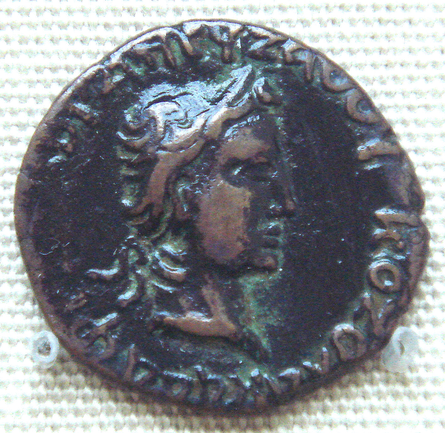 Kujula Kadphises Coin (Augustus Imitation)